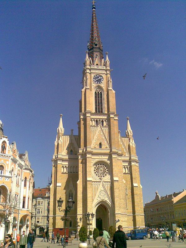 Kostel svaté Marie v historickém centru Nového Sadu